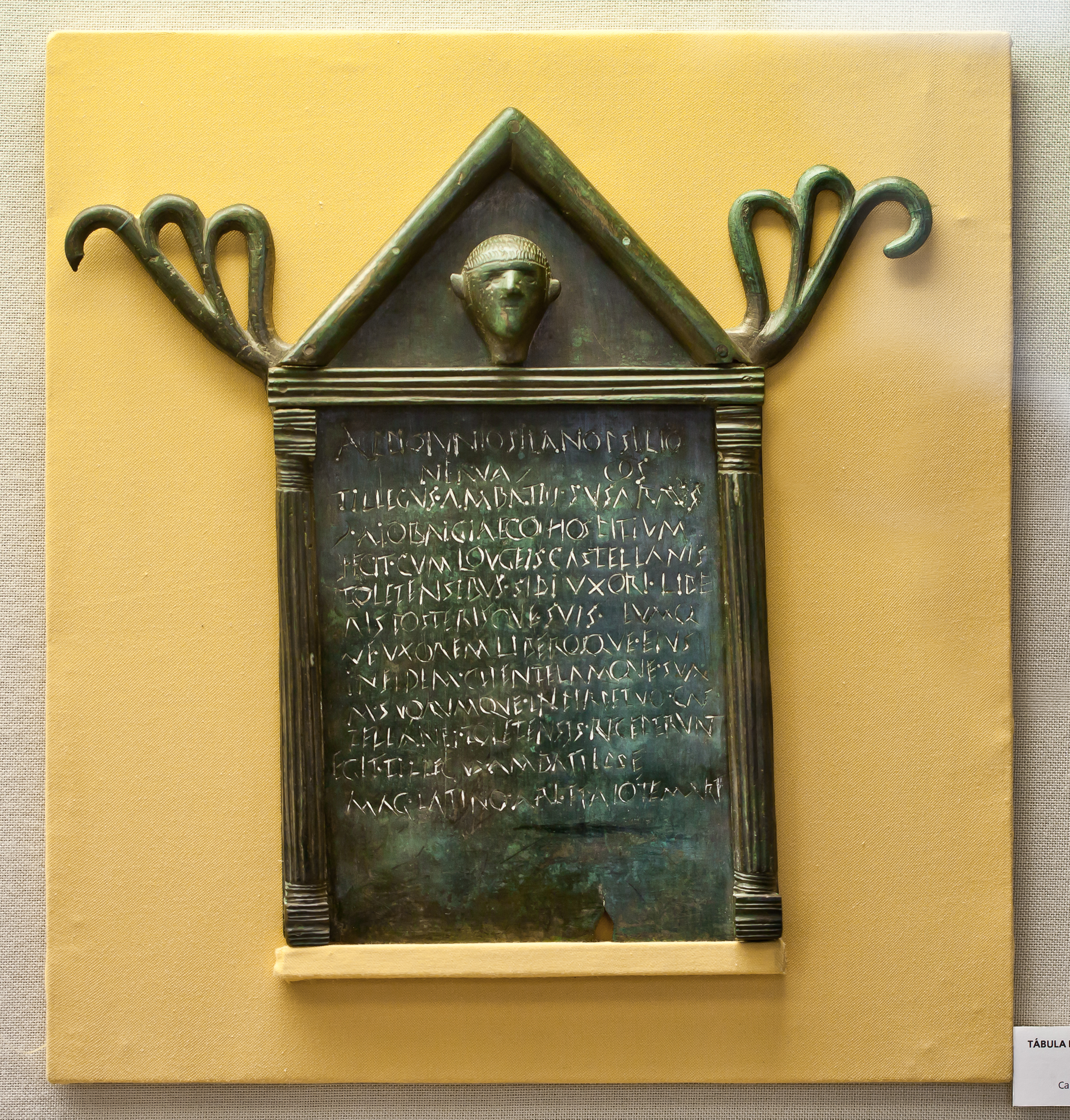 Tábula de hospitalidade - bronce - O carbedo - Esperante - O Folgoso do Courel - Museo Provincial de Lugo